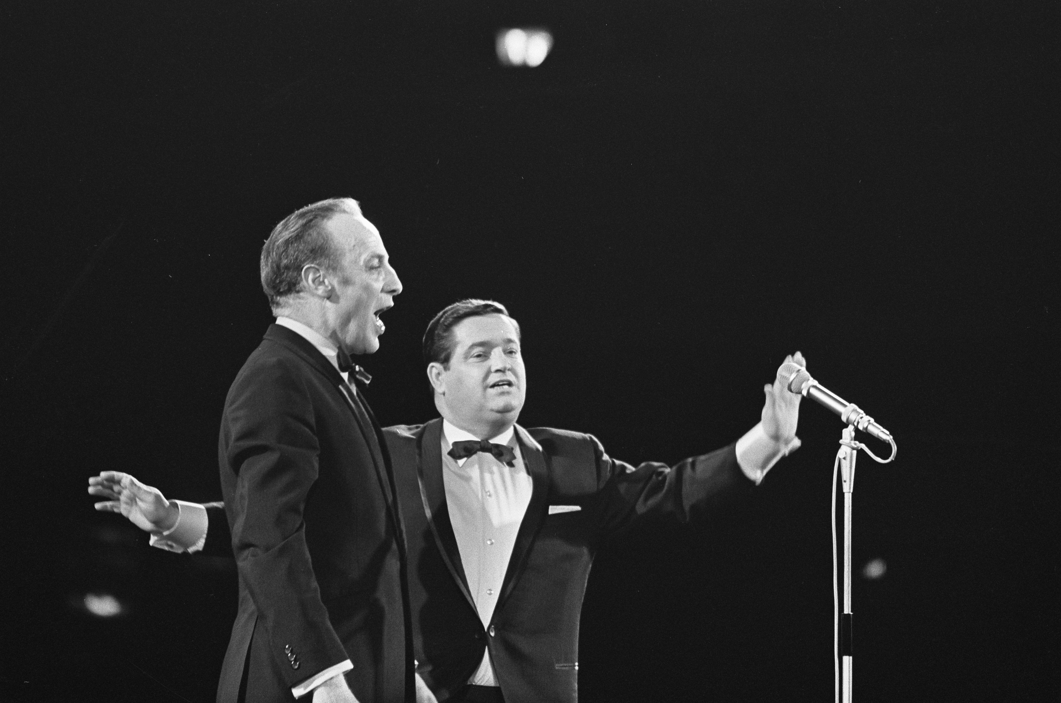 Collectie / Archief : Fotocollectie Anefo Reportage / Serie : Grand Gala du Disque 1968 Beschrijving : Grand Gala du Disque . Wim Sonneveld en Willy Alberti Datum : 8 maart 1968 Locatie : Amsterdam Trefwoorden : artiesten Persoonsnaam : Alberti, Willy, Sonneveld, Wim Fotograaf : Kroon, Ron / Anefo Auteursrechthebbende : Nationaal Archief Materiaalsoort : Negatief (zwart/wit) Nummer archiefinventaris : bekijk toegang 2.24.01.05 Bestanddeelnummer : 921-1486